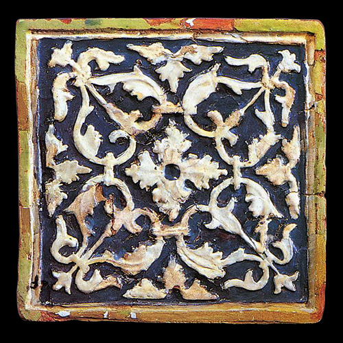 Кафля з Мірскага замка. Гліна, паліва Belarusian National History and Culture Museum Native nameНацыянальны гiстарычны музей Рэспублiкi БеларусьLocationMinsk, BelarusCoordinates53° 53′ 48″ N, 27° 33′ 20″ E Established1908Web page control : Q2034395 institution QS:P195,Q2034395